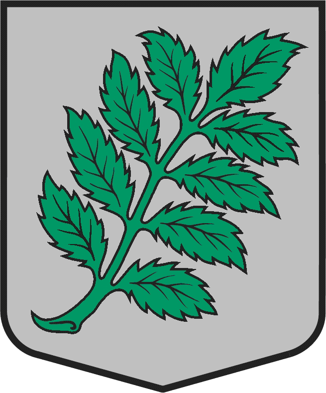 Coat of arms of Lībagu pagasts, Latvia